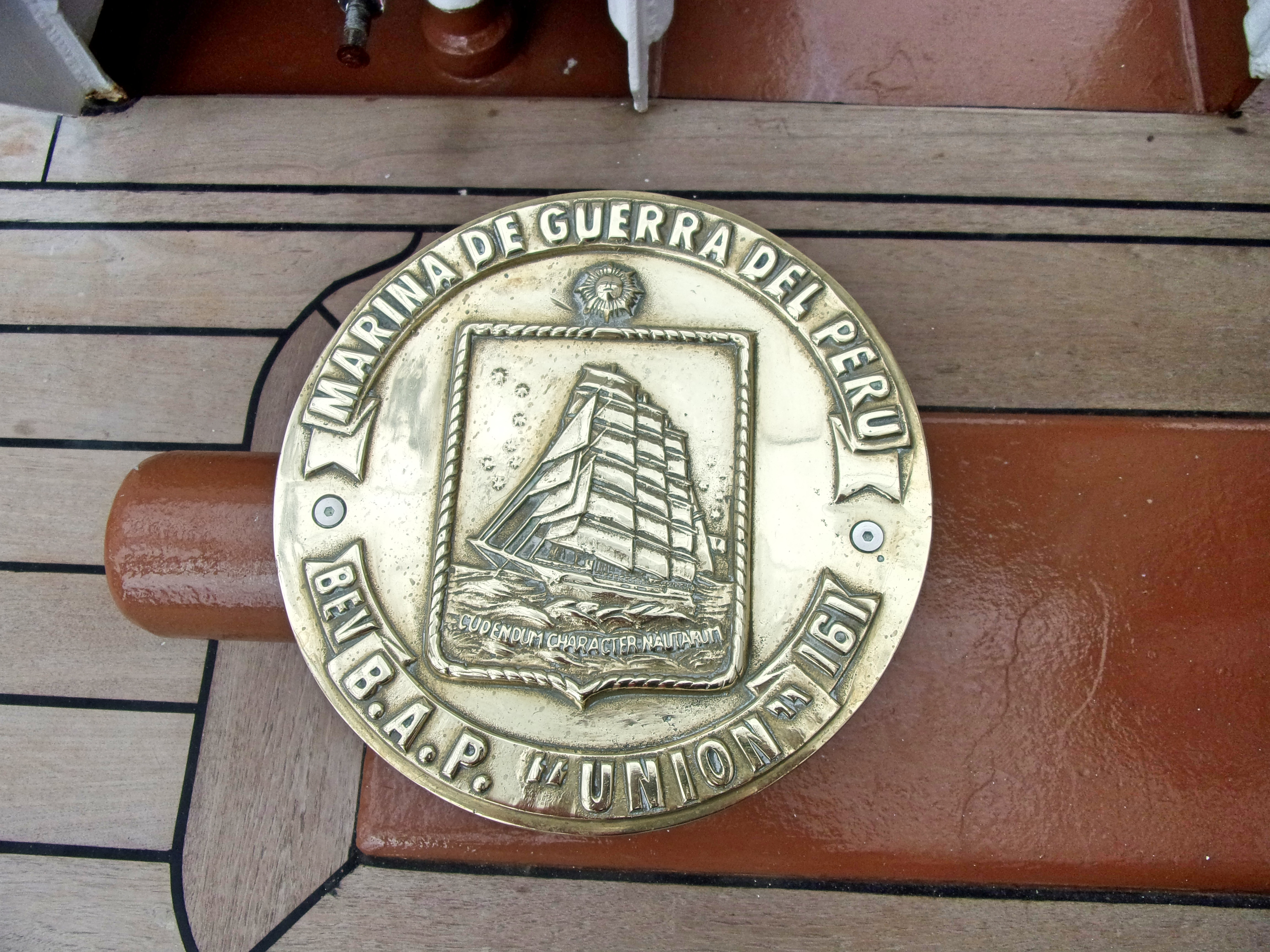 Das peruanische Segelschulschiff zu Besuch in Hamburg. Foto vom 4. August 2017 beim open ship an der Überseebrücke.